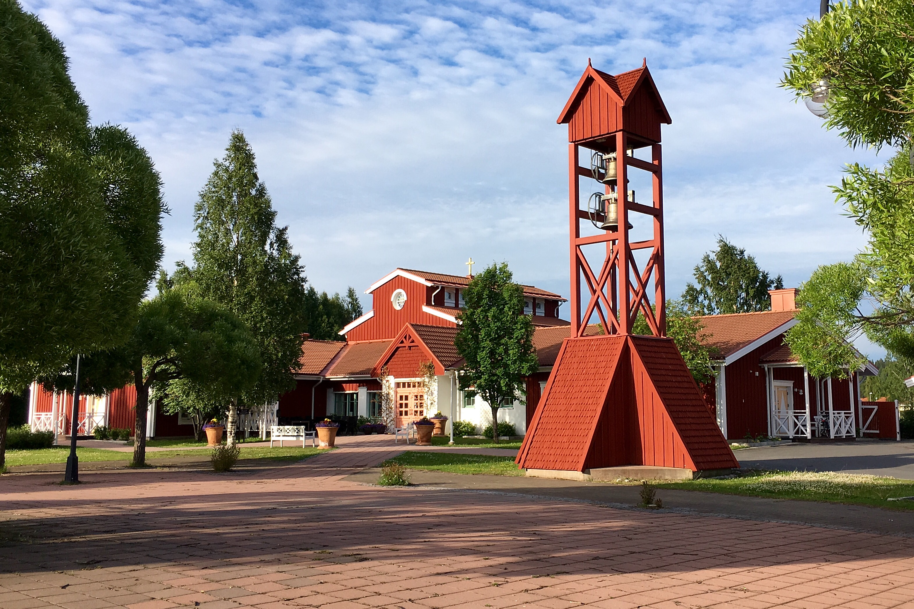 Mariakyrkan är en kyrkobyggnad som tillhör Sävasts församling i Luleå stift. Kyrkan ligger i Sävast omkring sju kilometer söder om Boden och är uppförd 1994.